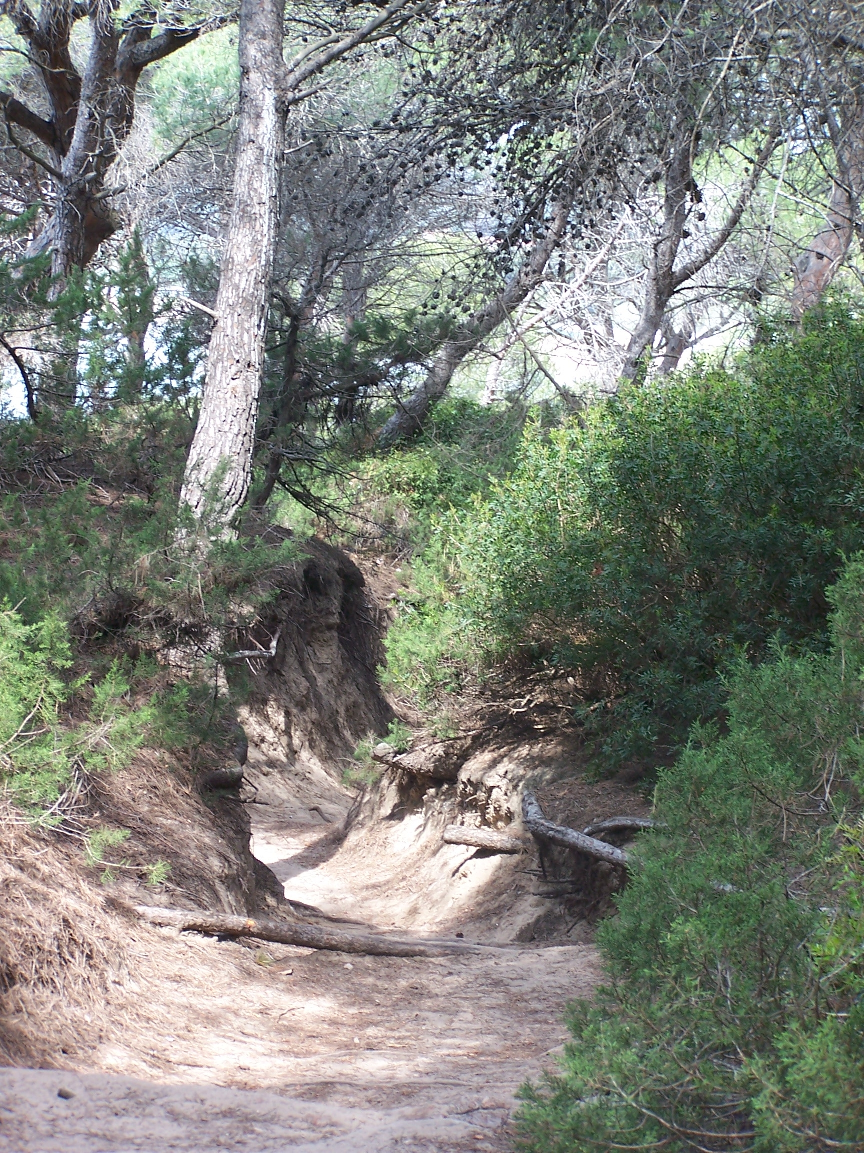 Camí del Bosc de la Marquesa per accedir a les cales